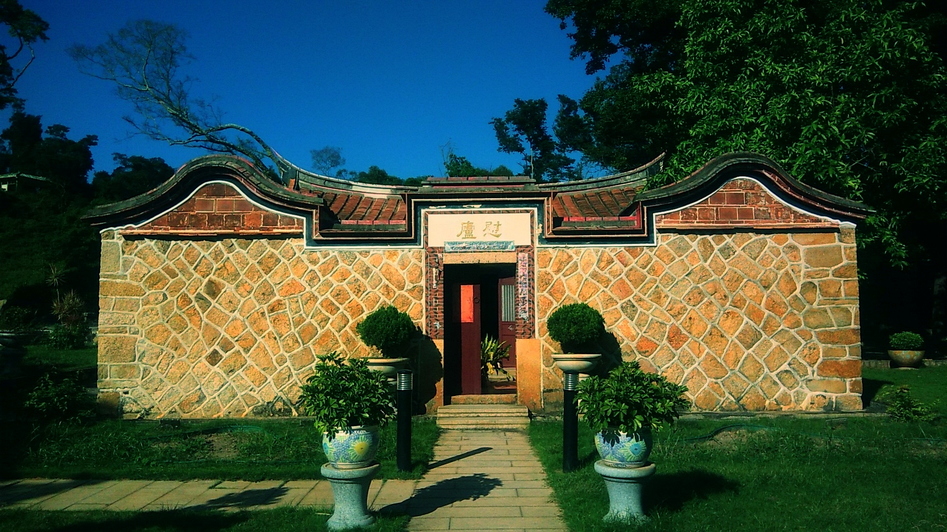 金門慰廬